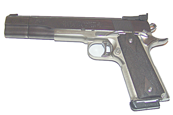 Colt .45,Gold Cup - MKIV, Avaré, São Paulo, Brasil